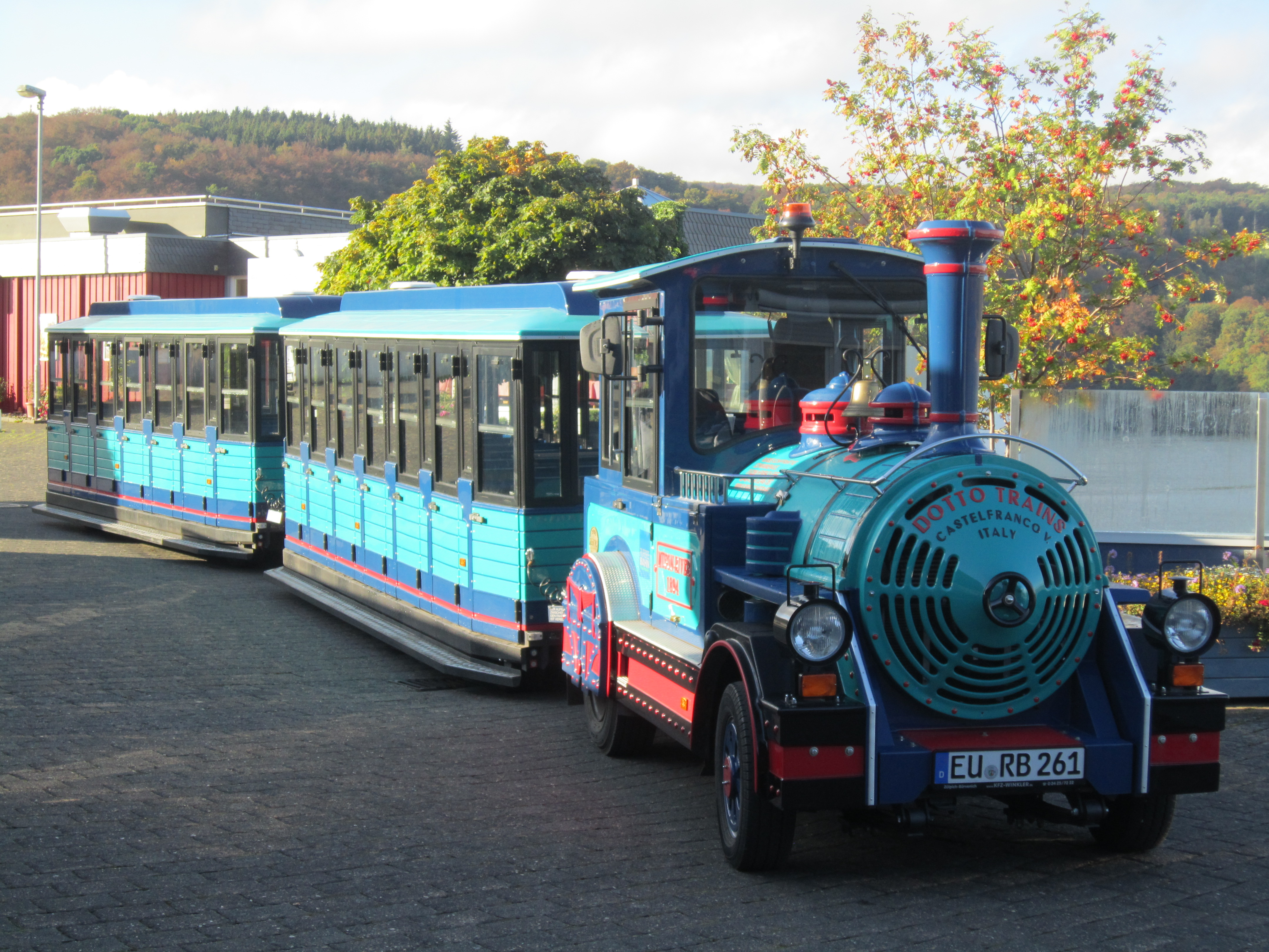 Wegebahn in Schwammenauel an der Rurtalsperre